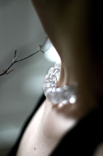 Schmuck: Halskette: , Fotograf: Thomas Wanhoff